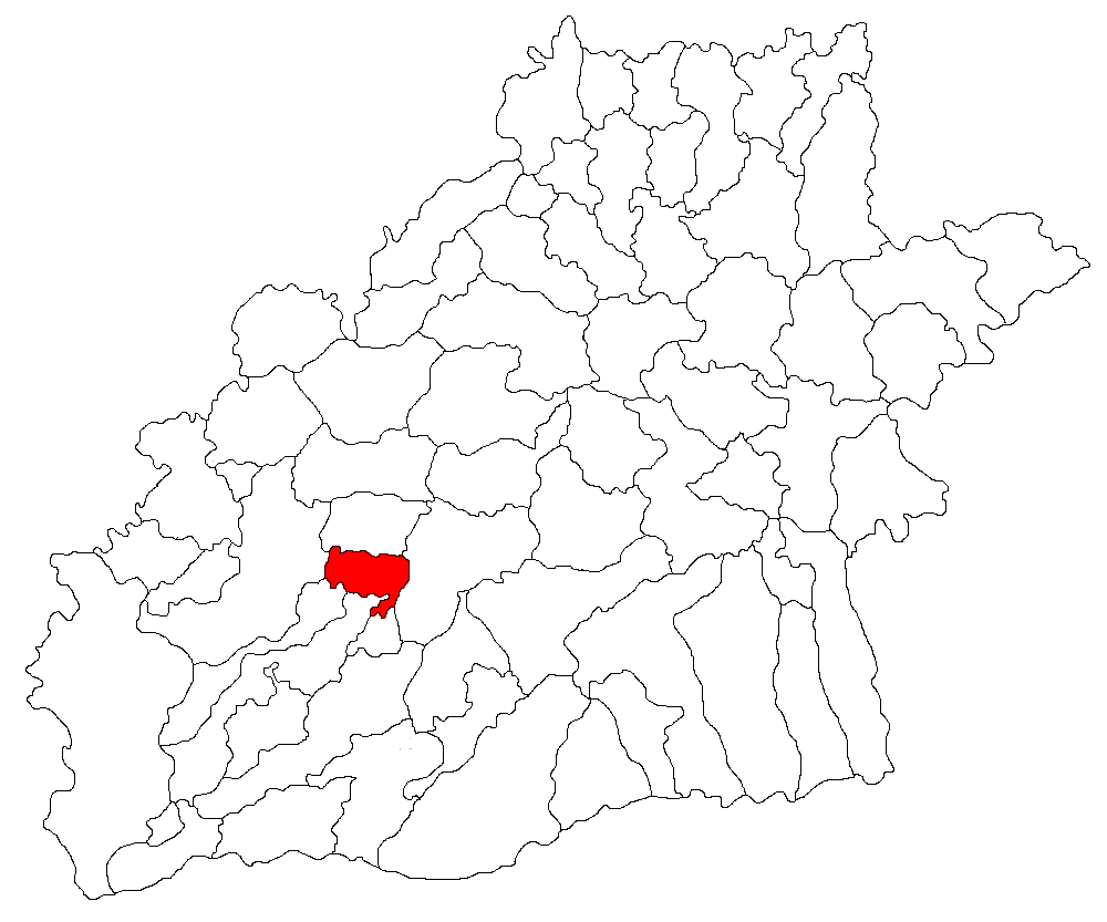 Categorie:Hărţi ale judeţului Sibiu